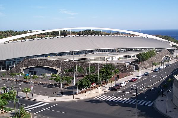 Recinto ferial de Santa Cruz de Tenerife (Tenerife, España).